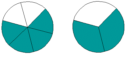 4/6 e 2/3